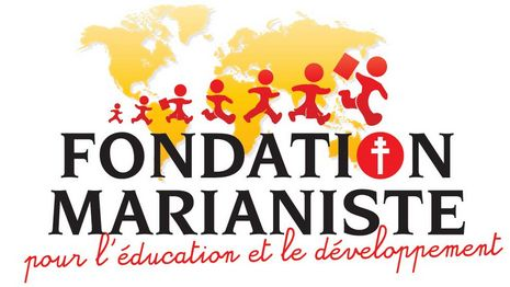 Logo Fondation Marianiste